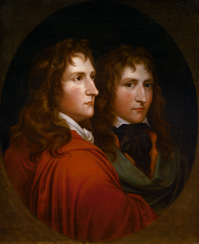 Doppelportrait: Franz Gerhard von Kügelgen und Ferdinand Carl von Kügelgen